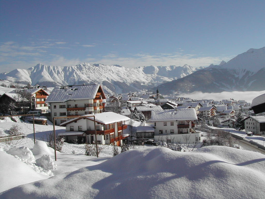 Fiss an Tirol